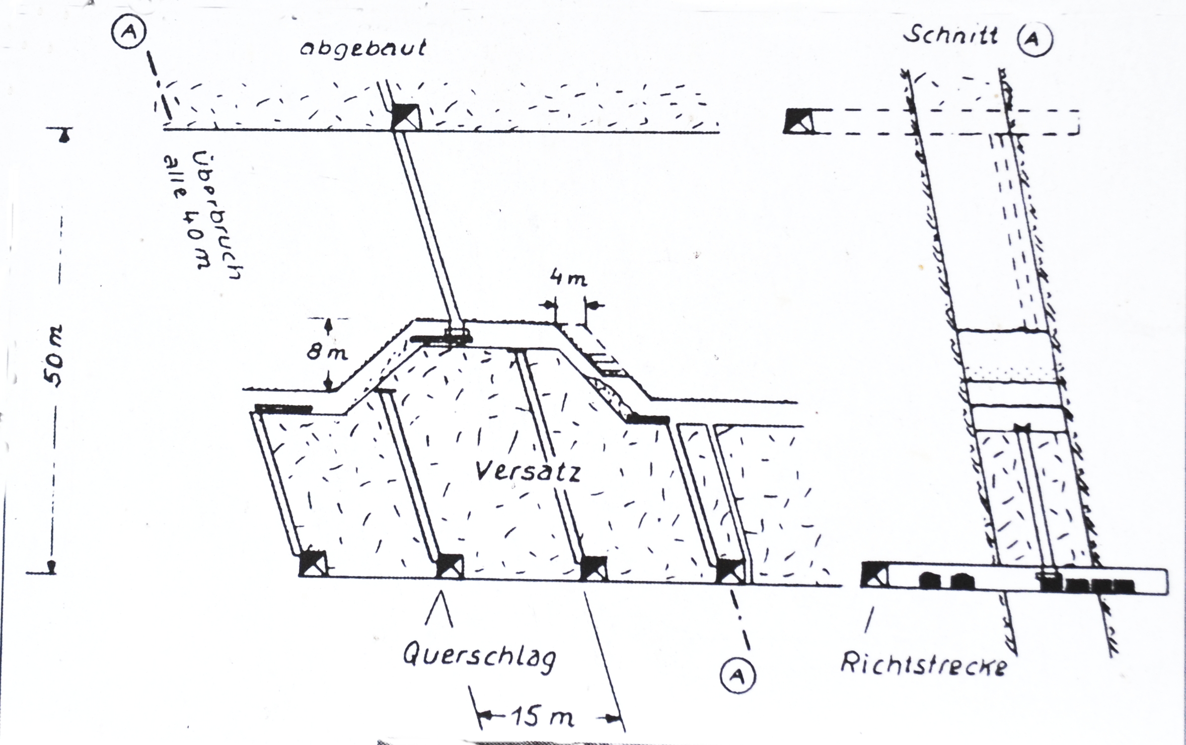 Grube Füsseberg - Friedrich Wilhelmː Skizze zum Abbauverfahren Firstenstossbau